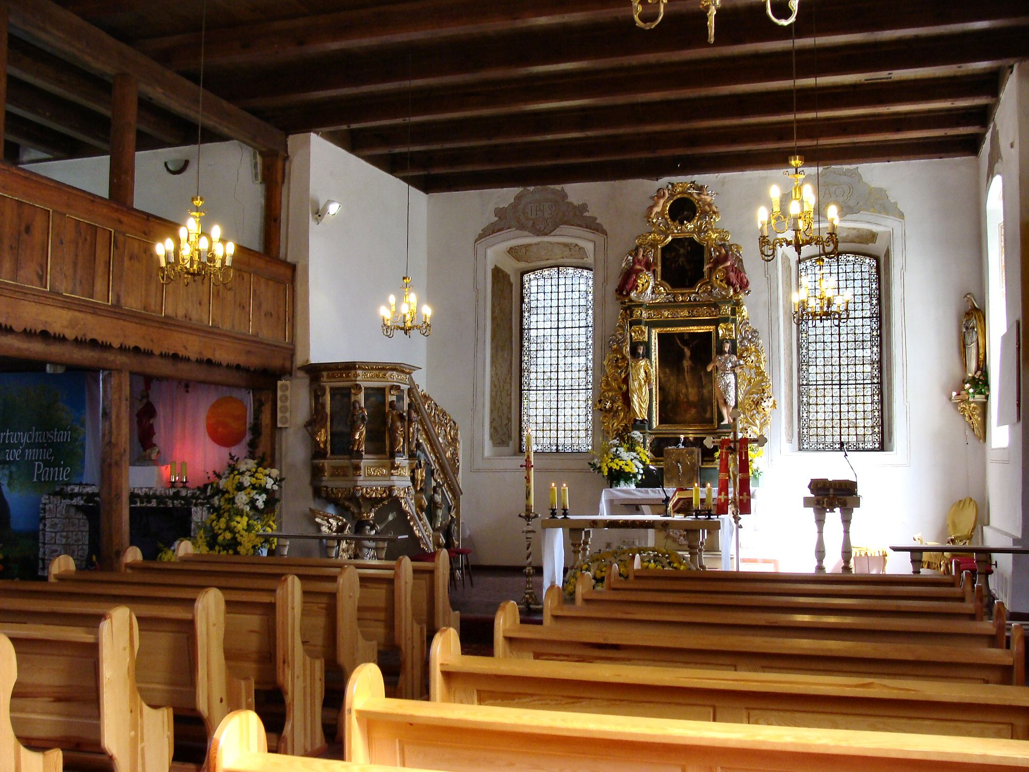 Kościół Niepokalanego Serca NMP przy ul. Nehringa w Szczecinie Stołczynie